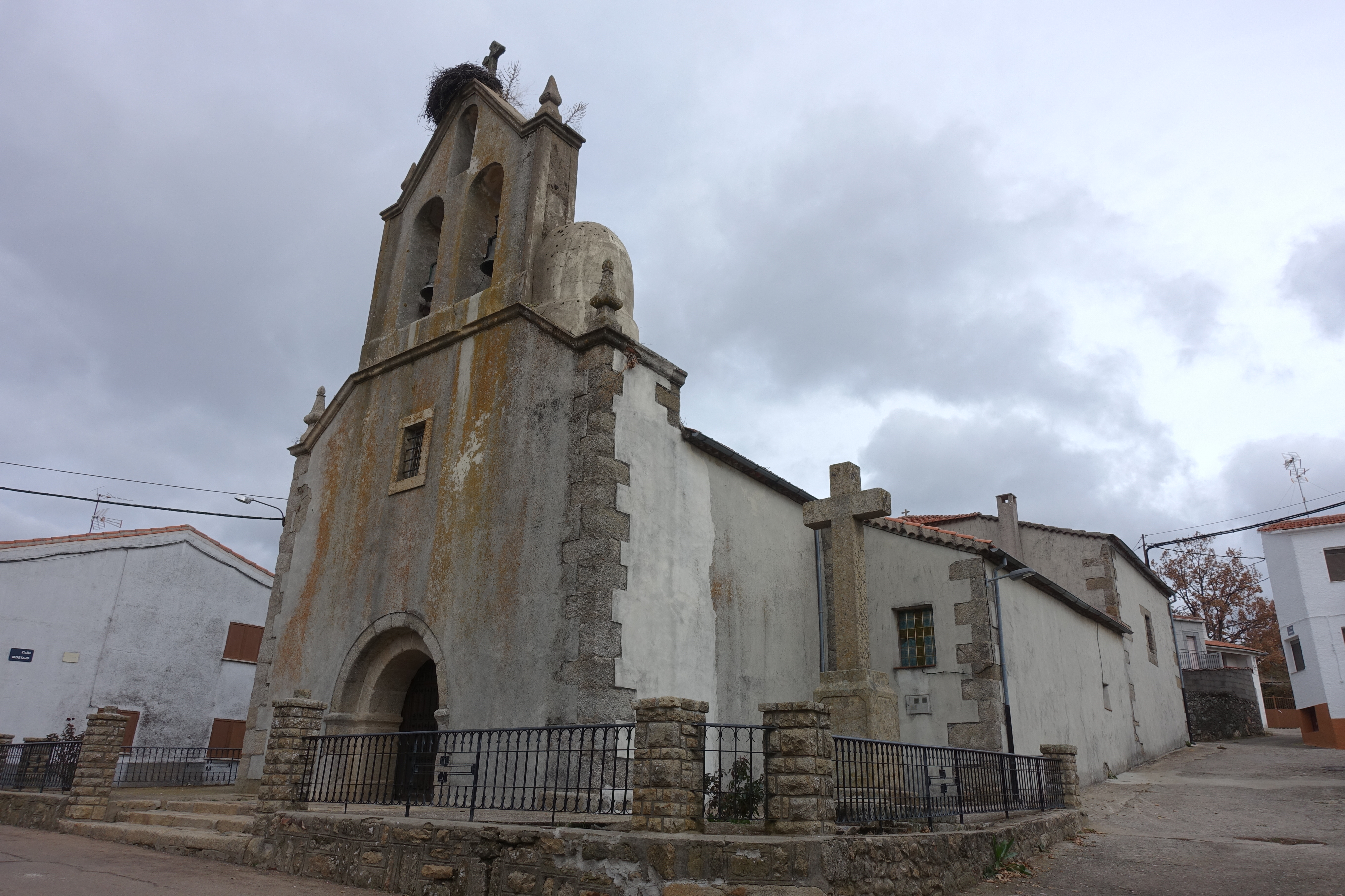 Iglesia de Nuestra Señora del Carmen, Peñaparda (Salamanca, España).